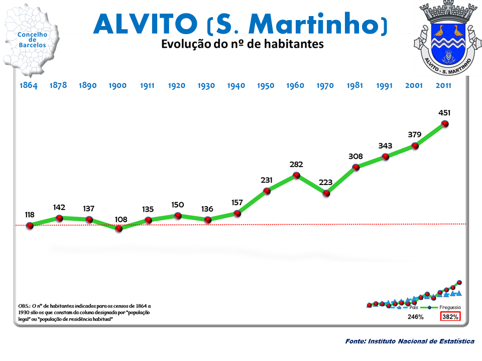 Censos 1864/2011